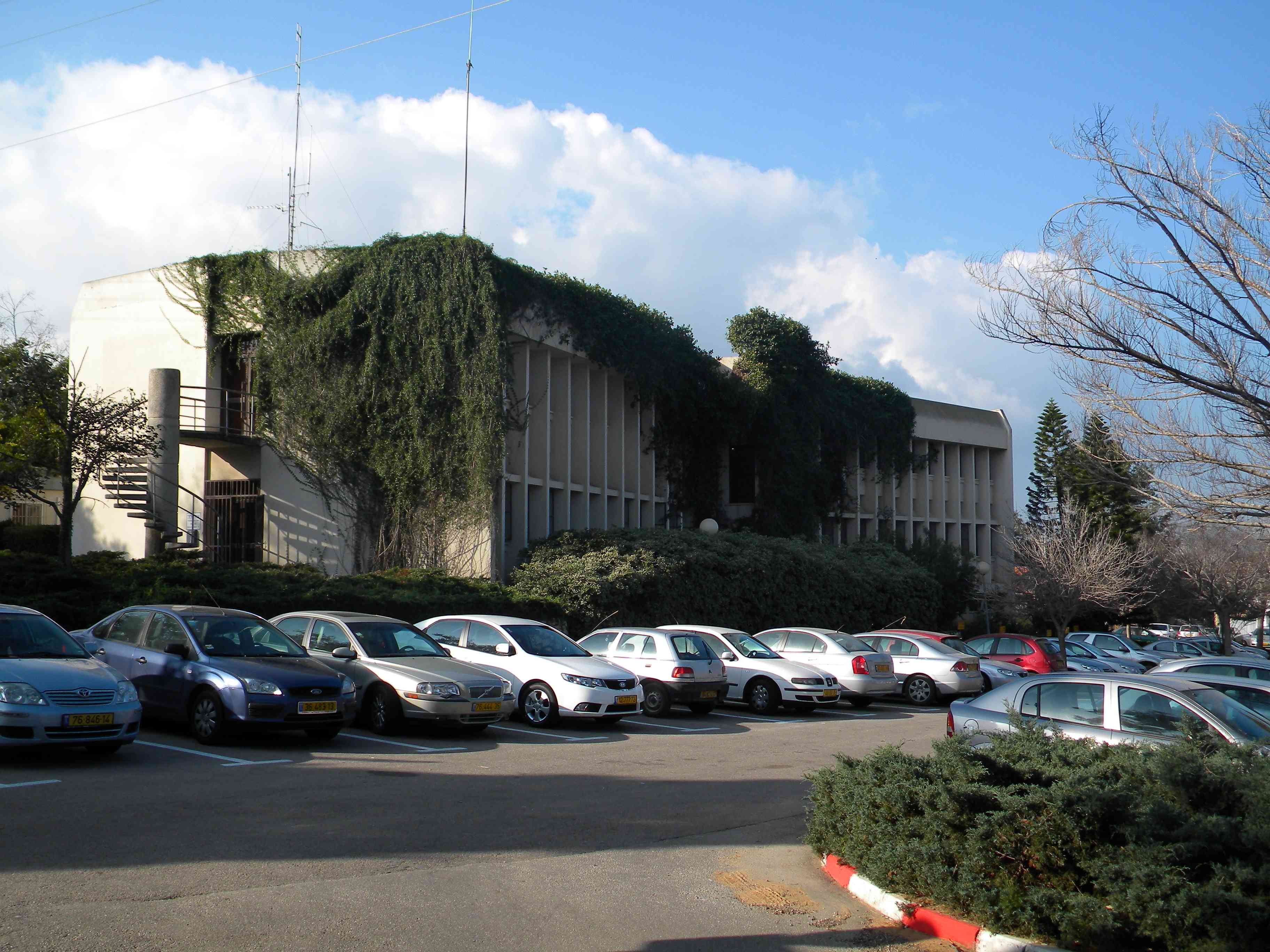 בניין המועצה האיזורית עמק חפר